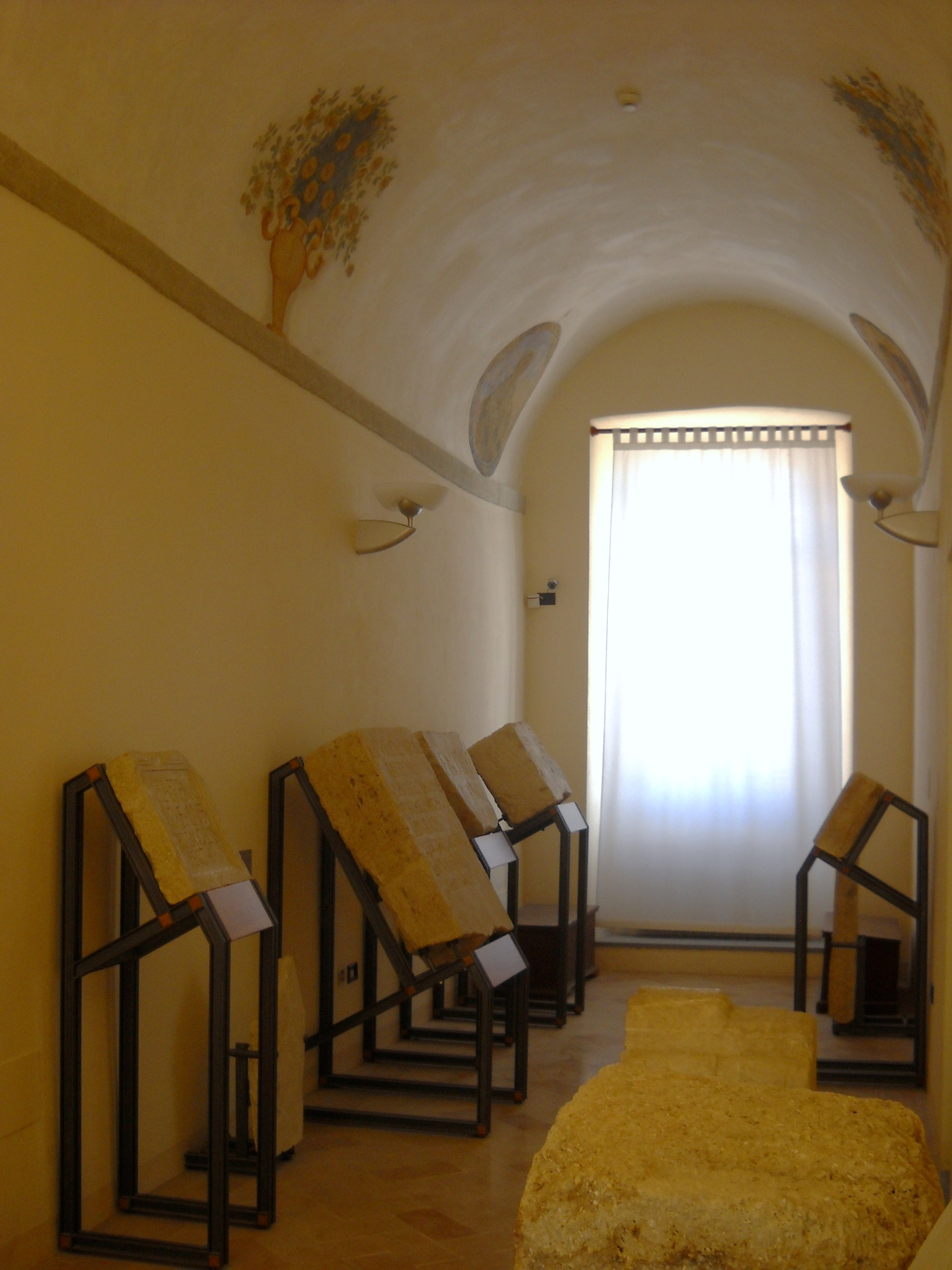 Antiquarium (particolare iscrizioni) ̠ Complesso museale San Francesco